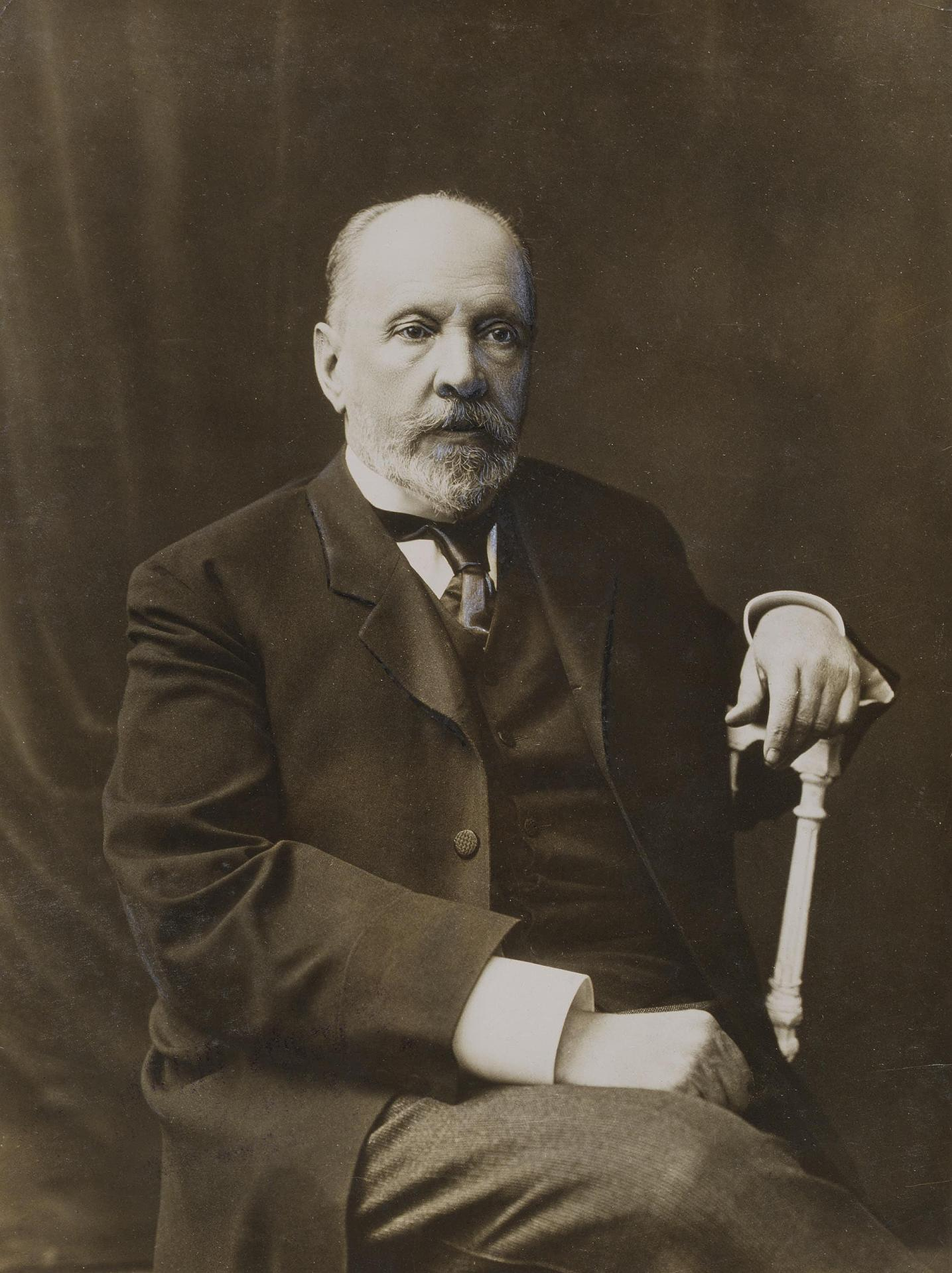 Витте, Сергей Юльевич. Фотография: бромсеребряный отпечаток. 20х16 см